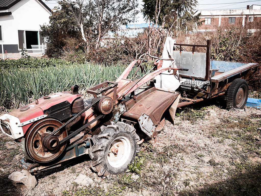 근래에 노령인구의 증가및 농촌의 인구 감소로 인해 사용이 중단된 경운기를 간간히 볼 수 있다.